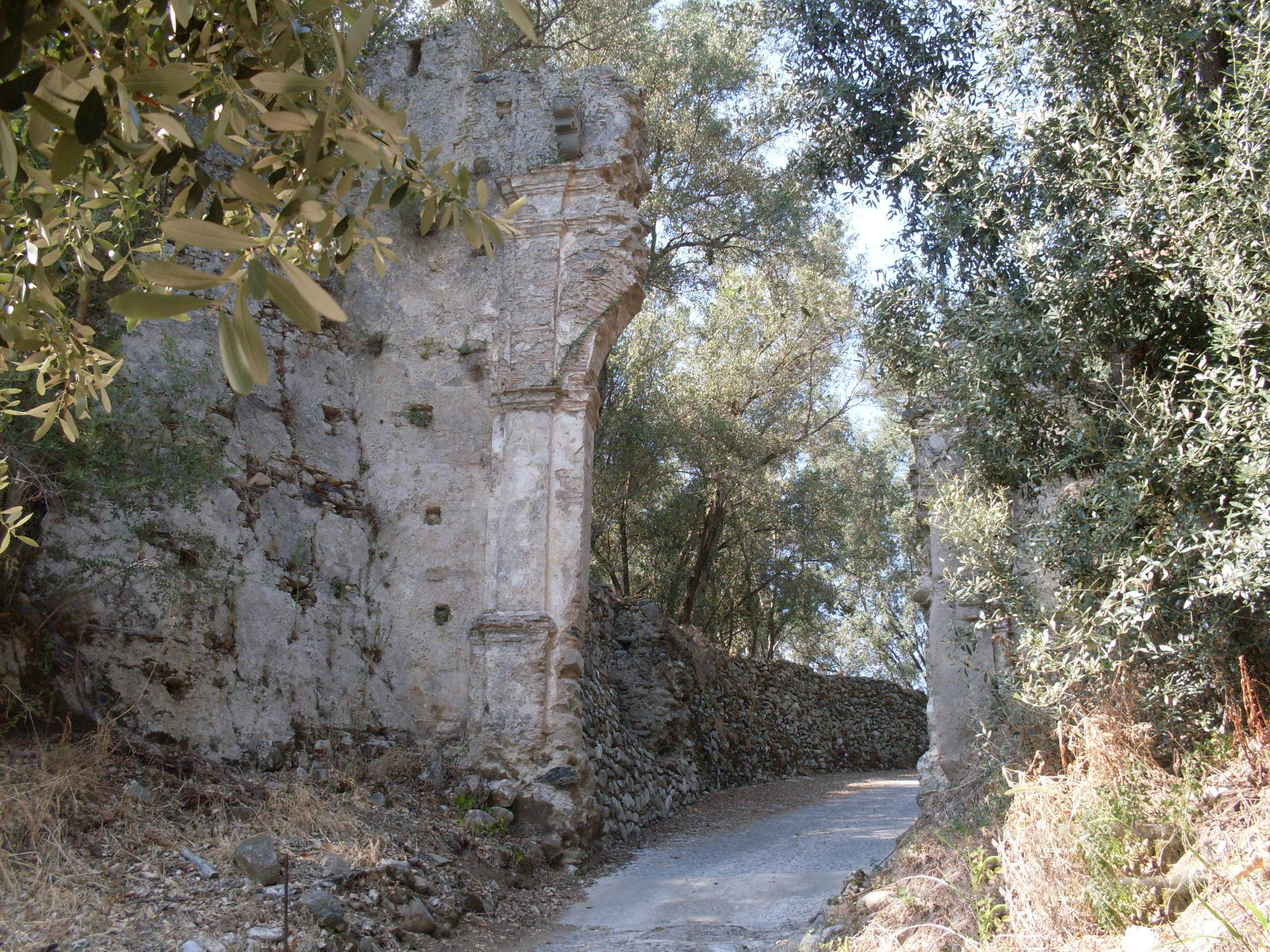 Porta Sud vista dall'esterno della città medievale.